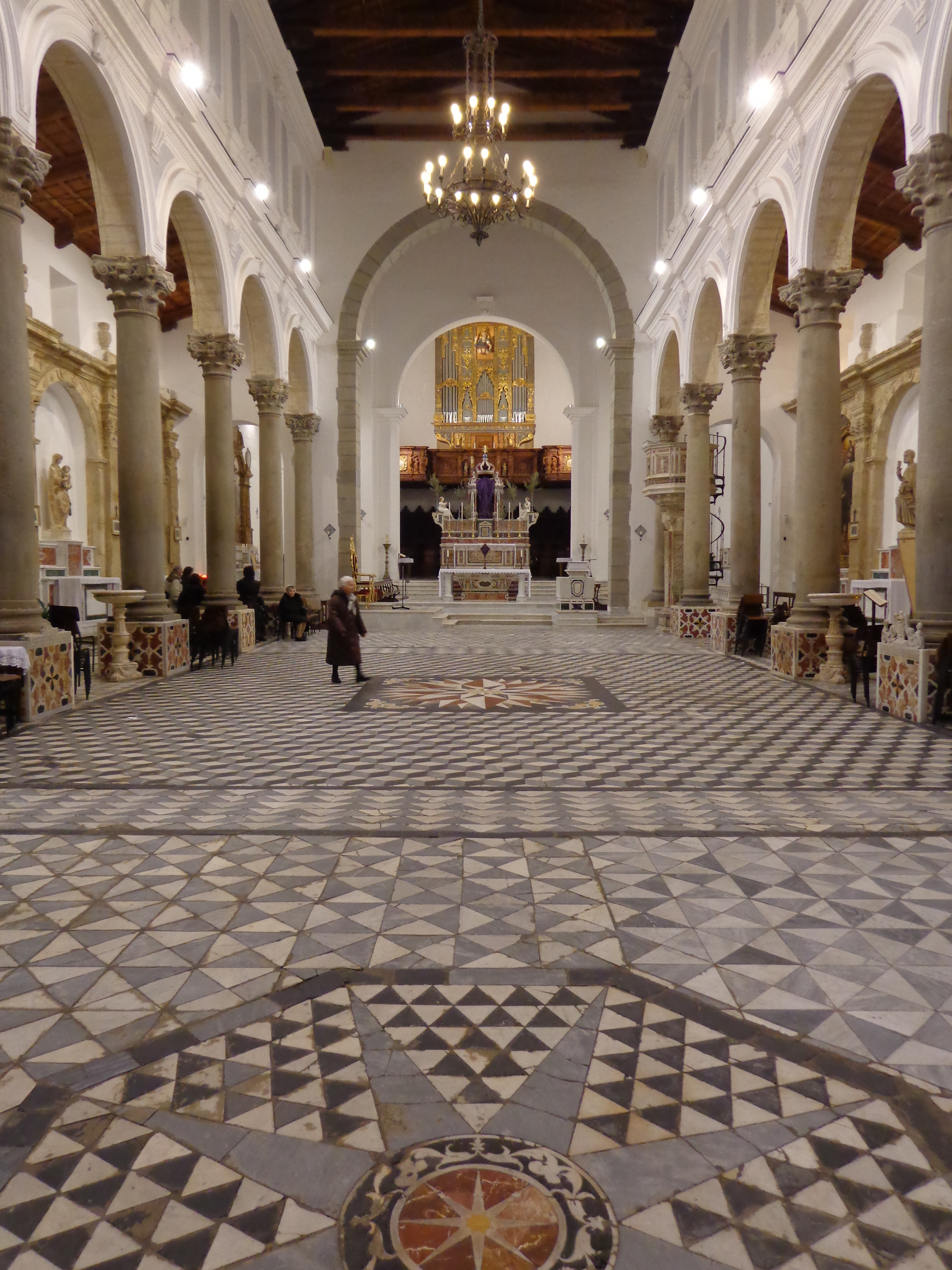 Pavimento Duomo Castroreale